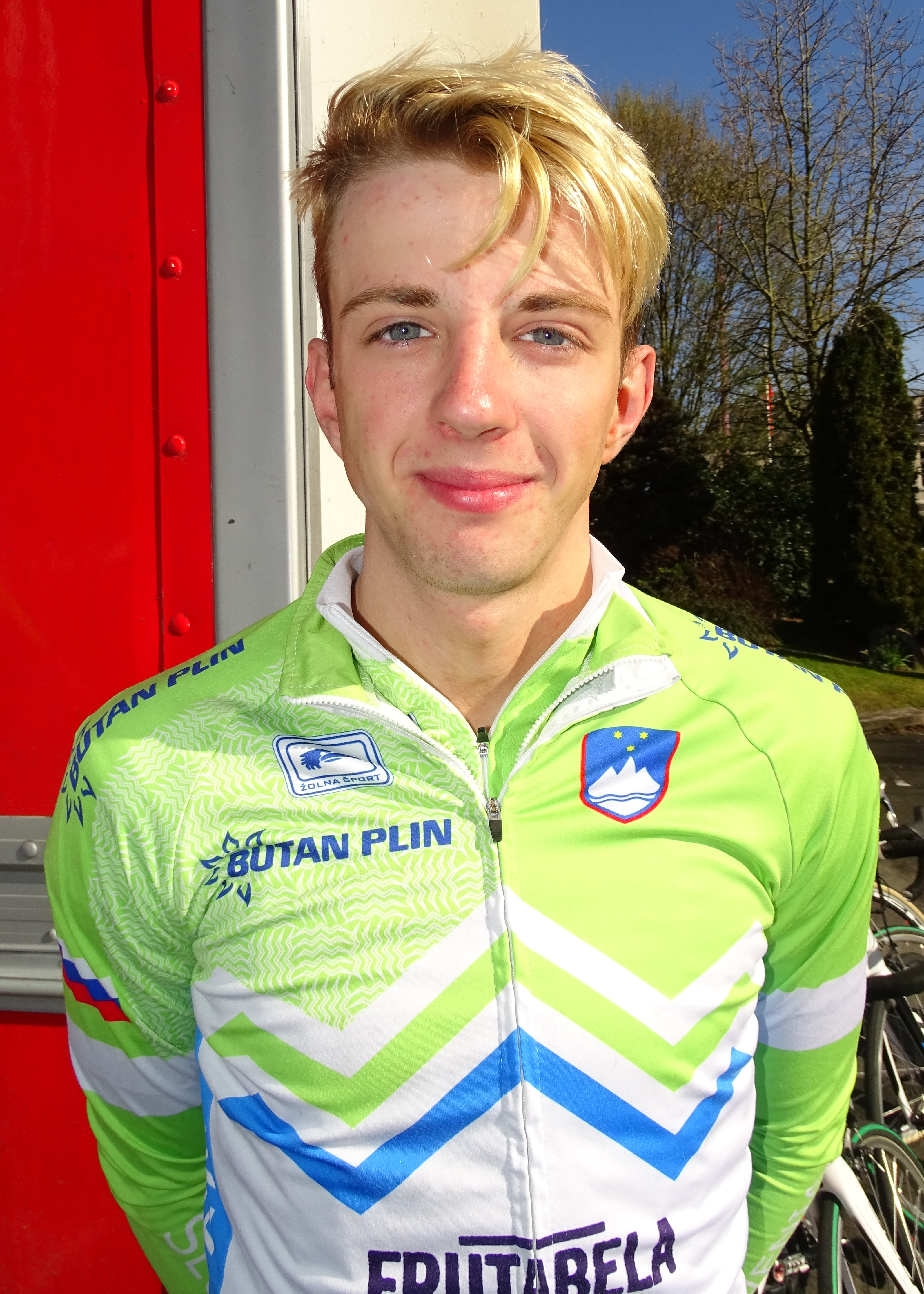 Reportage réalisé le dimanche 10 avril à l'occasion du départ du Paris-Roubaix juniors 2016 à Saint-Amand-les-Eaux, France.